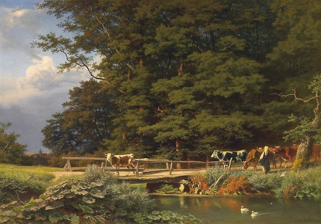 Heimtrieb. Vor dichtem Laubwald Hirtin mit ihrem Vieh auf dem Heimweg. Links die Silhouette einer nahen Stadt. Später, sonniger Sommertag. Signiert unten rechts: A. Bromeis. Öl auf Leinwand. 172 × 120 cm.